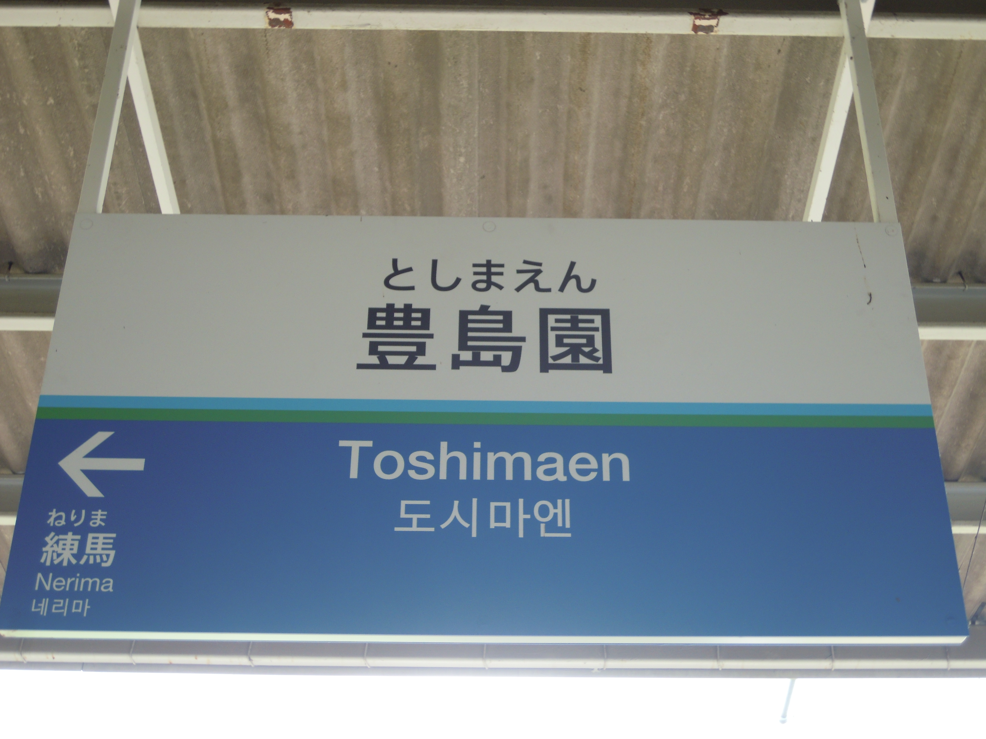 西武豊島園駅、駅名標